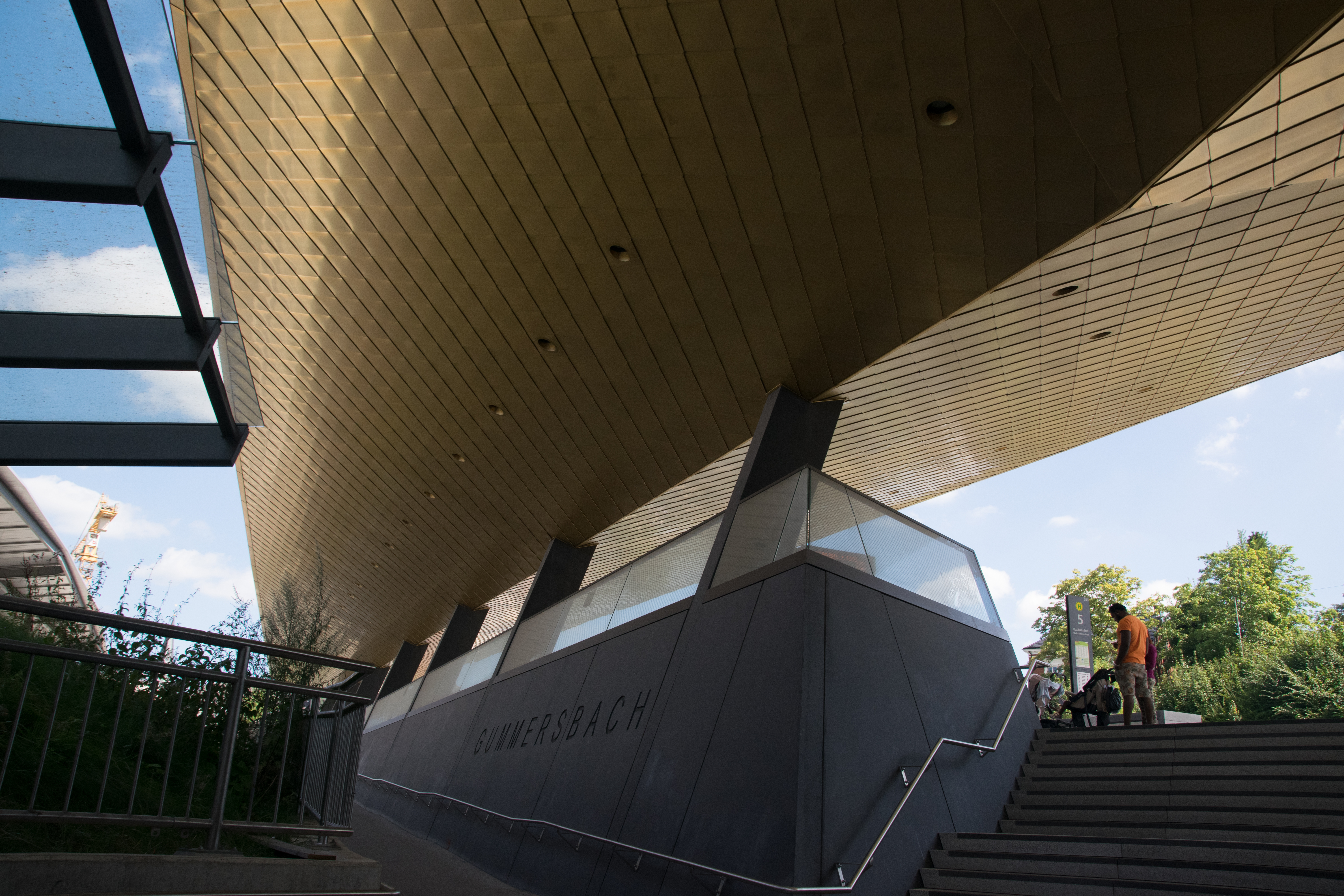 Busbahnhof in Gummersbach